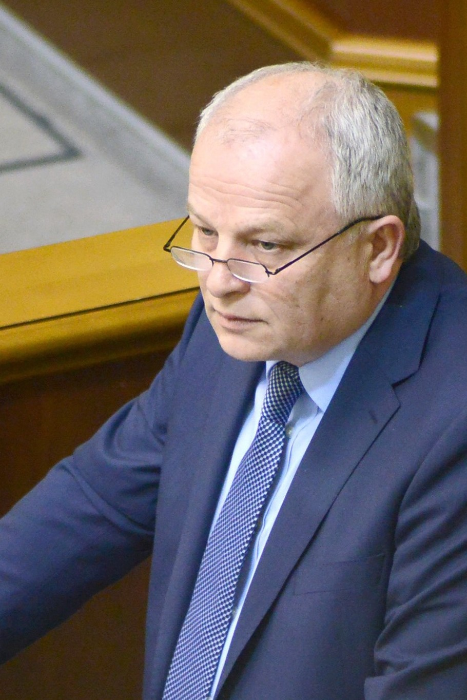 ВЕРХОВНА РАДА УКРАЇНИ 2015 фотограф Вадим Чуприна